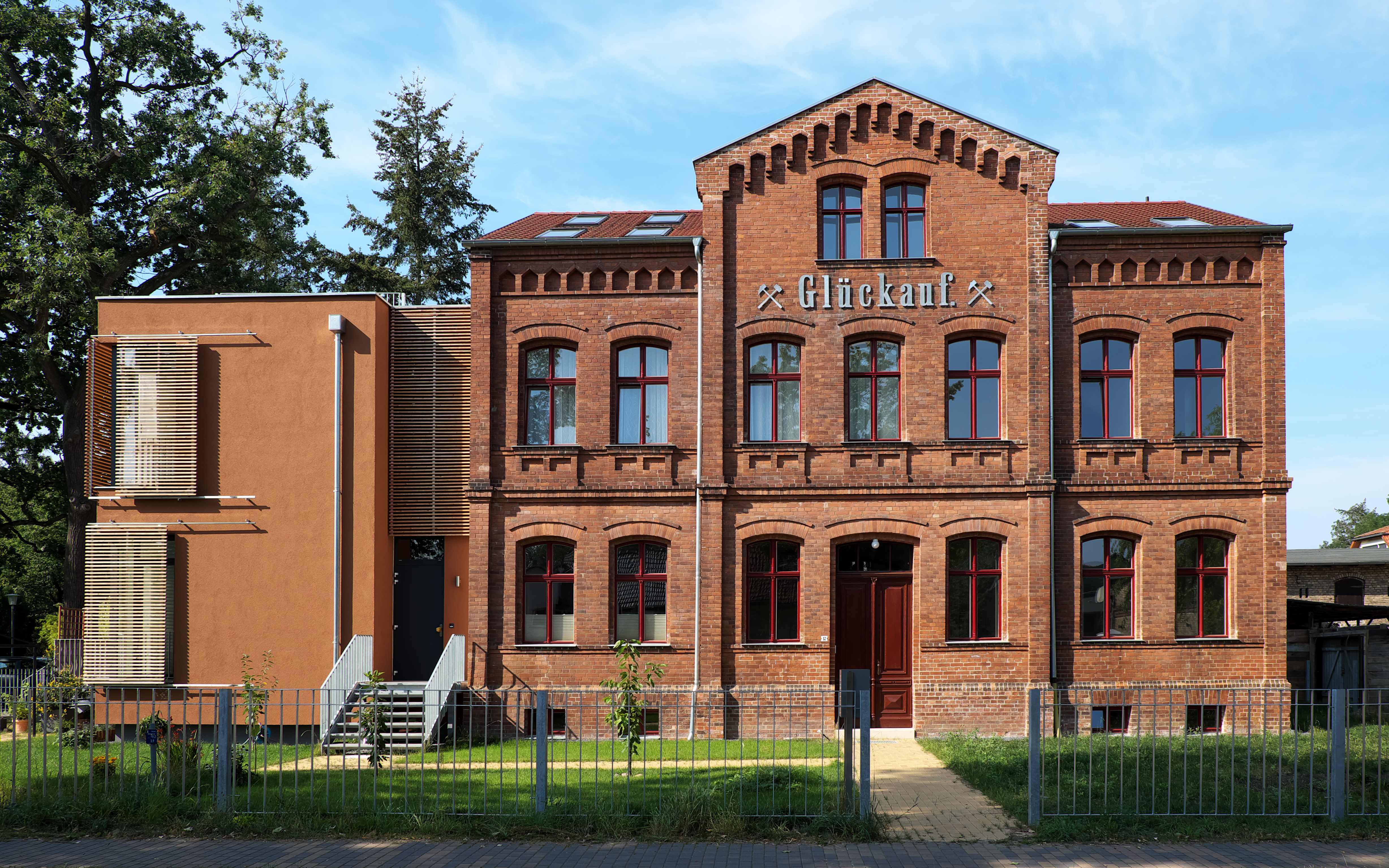 Restauriertes Verwaltungsgebäude der ehemaligen Braunkohlengrube „Centrum“ an der Krummenseer Straße in Schenkendorf (Mittenwalde). Baudenkmal